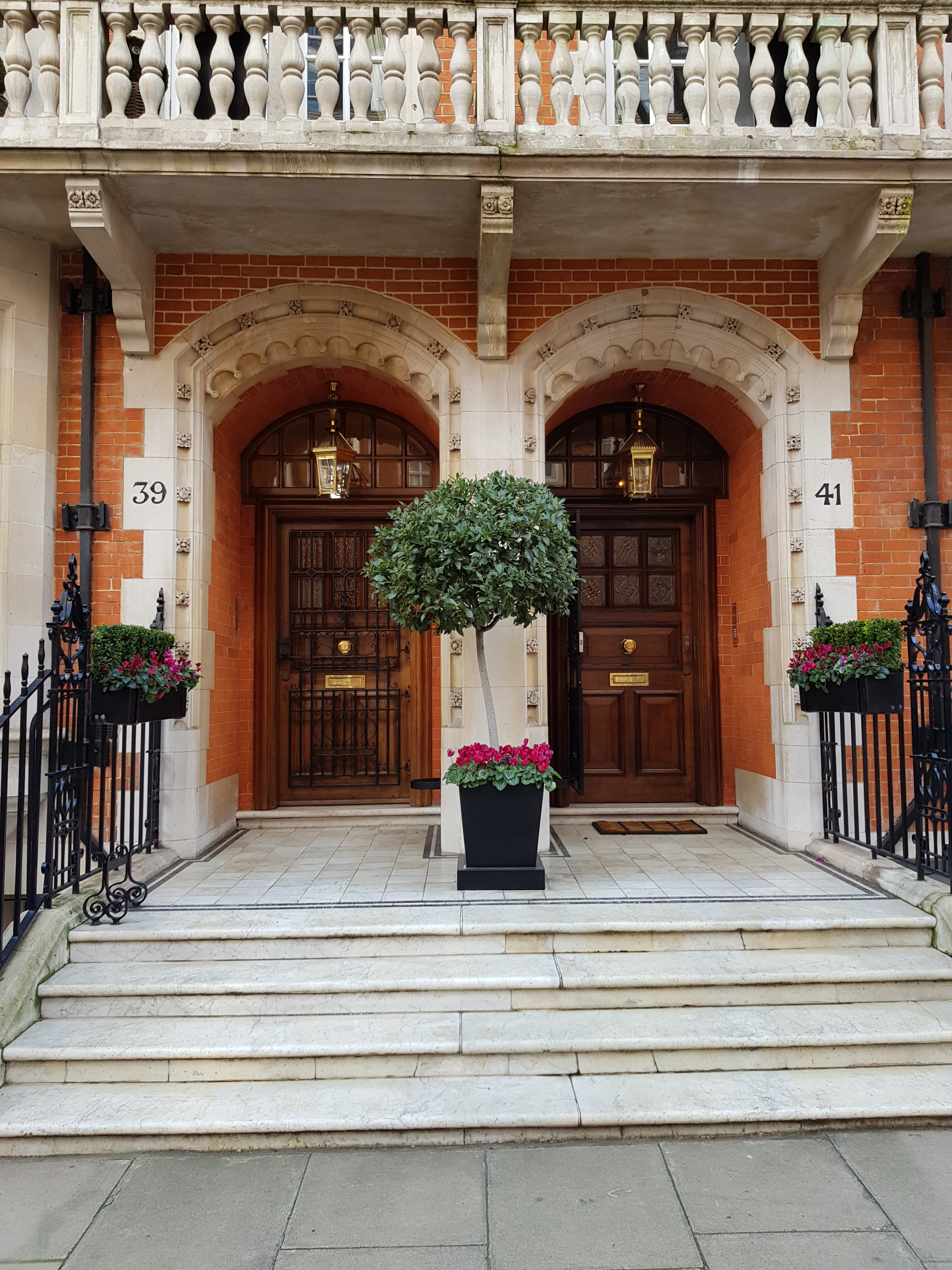 Entrée des n° 39 et 41, South Street, Mayfair, Londres.